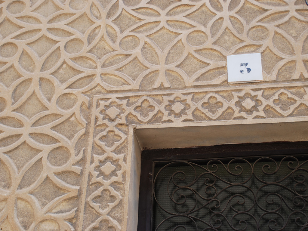 Ejemplo de esgrafiado en una fachada de Segovia, con cenefa recercando puertas y ventanas.